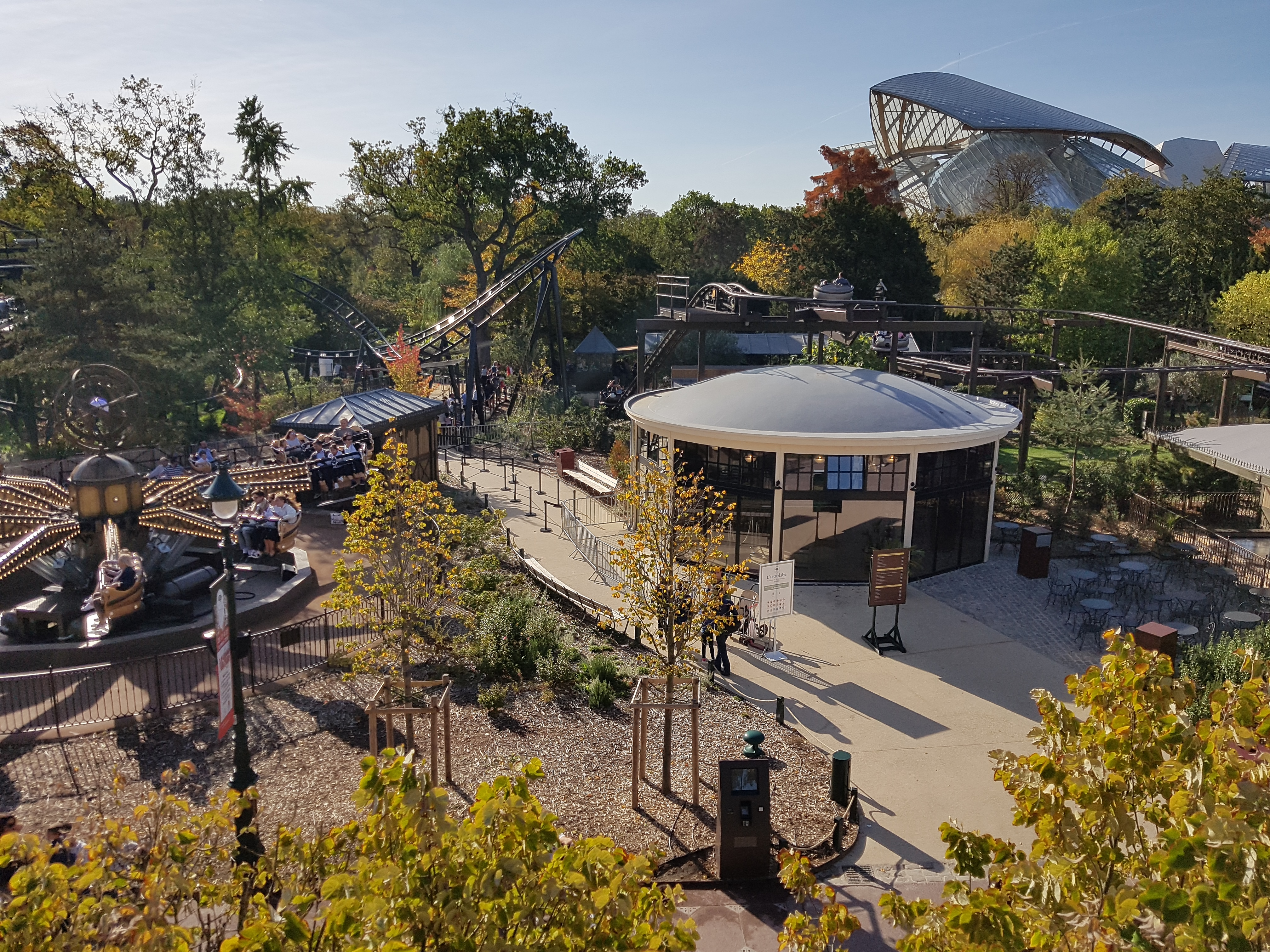 Fondation Louis Vuitton vue du Jardin d'acclimatation - Paris